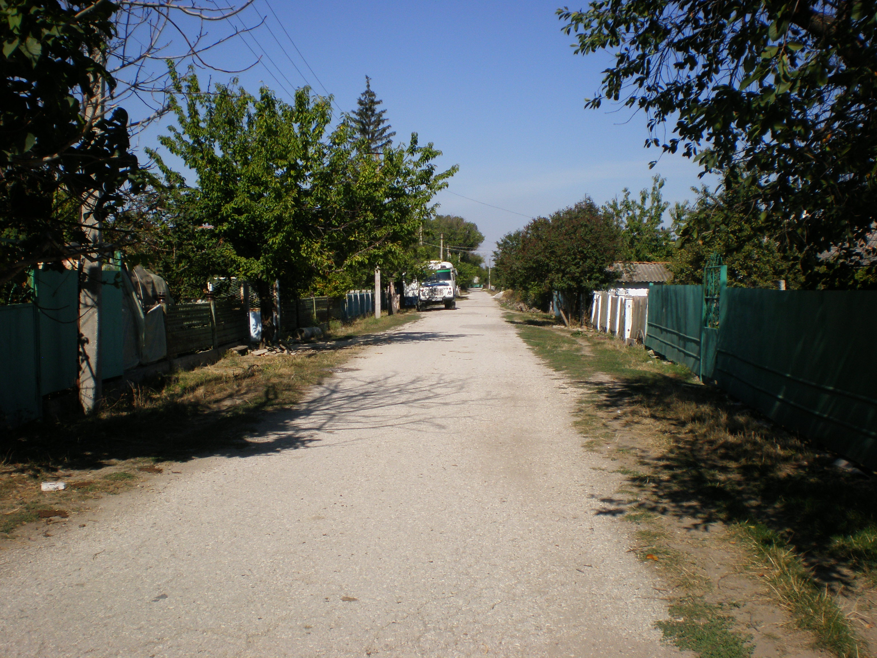 Kostotchkovka (Crimée, Ukraine) : Ulitsa Priretchnaïa